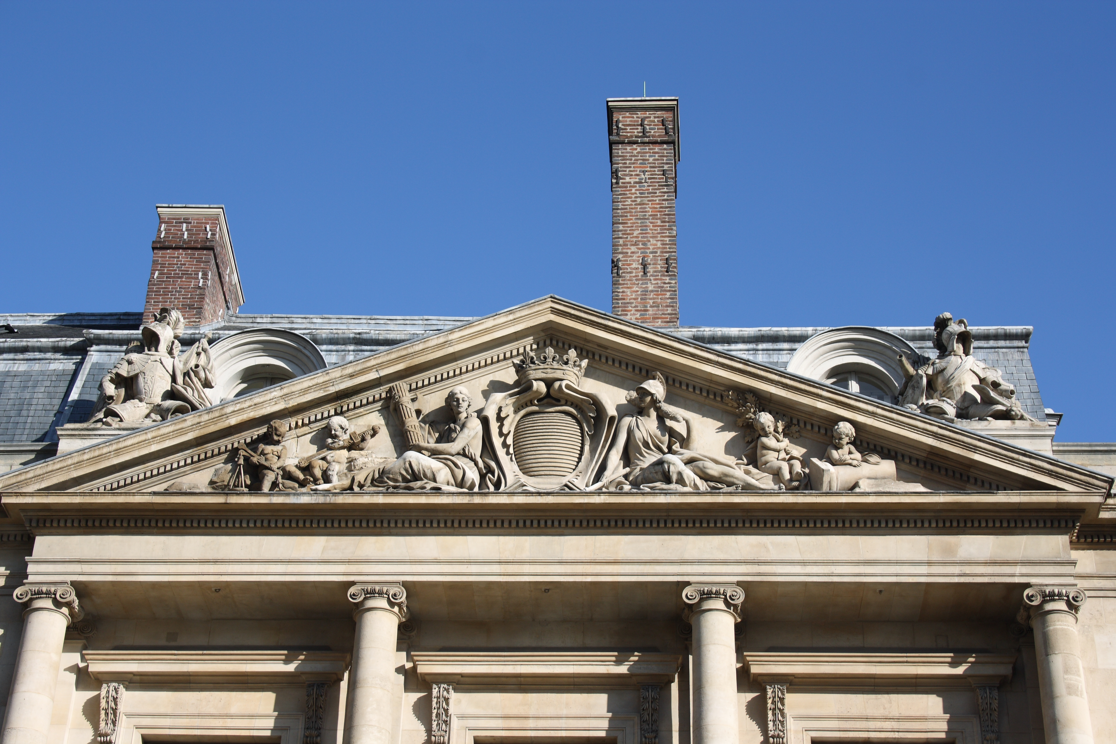 Sitz des Conseil d’État im Palais Royal im 1. Arrondissement in Paris (Île-de-France/Frankreich)